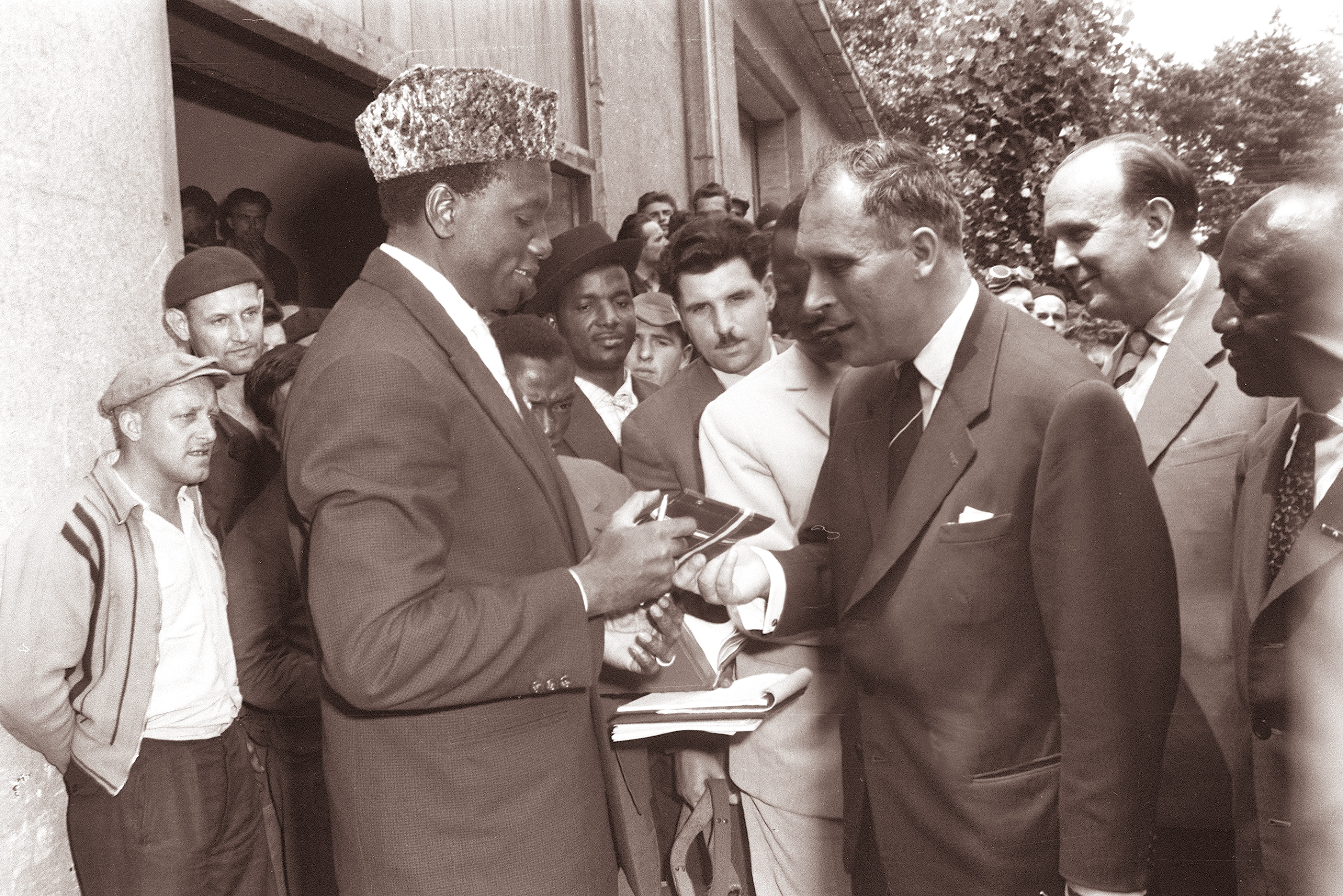 Predsednik republike Mali Modibo Keita v Mariboru